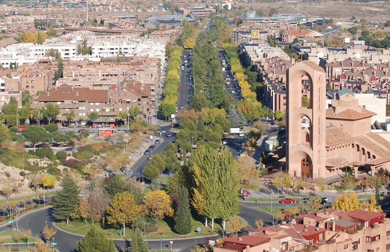 Vista aérea de la Avenida de Europa de Pozuelo